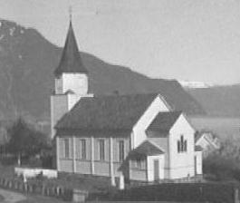 Fresvik kyrkje